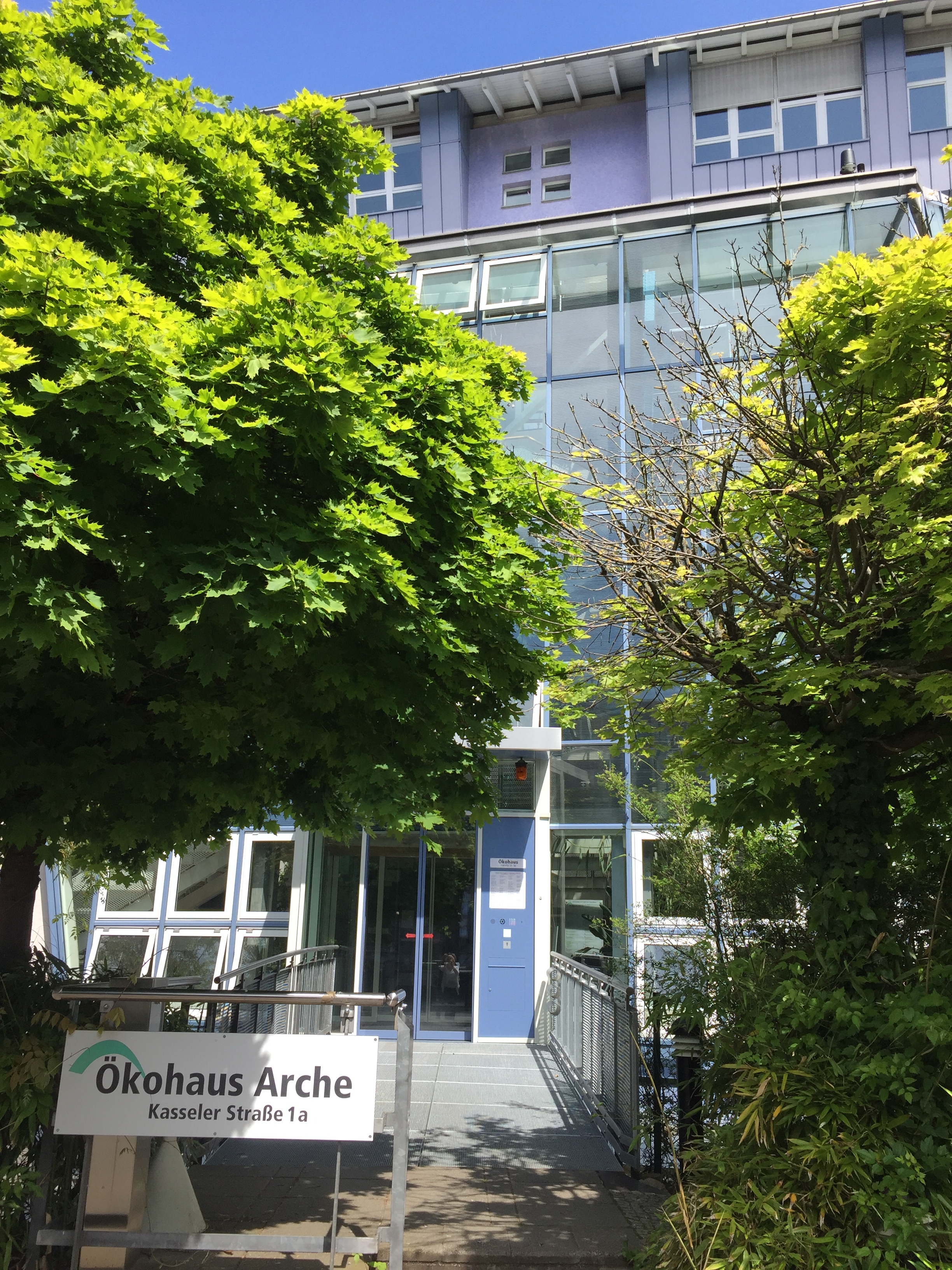 Ökohaus in Frankfurt, Adresse des Feministischen Frauengesundheitszentrums .